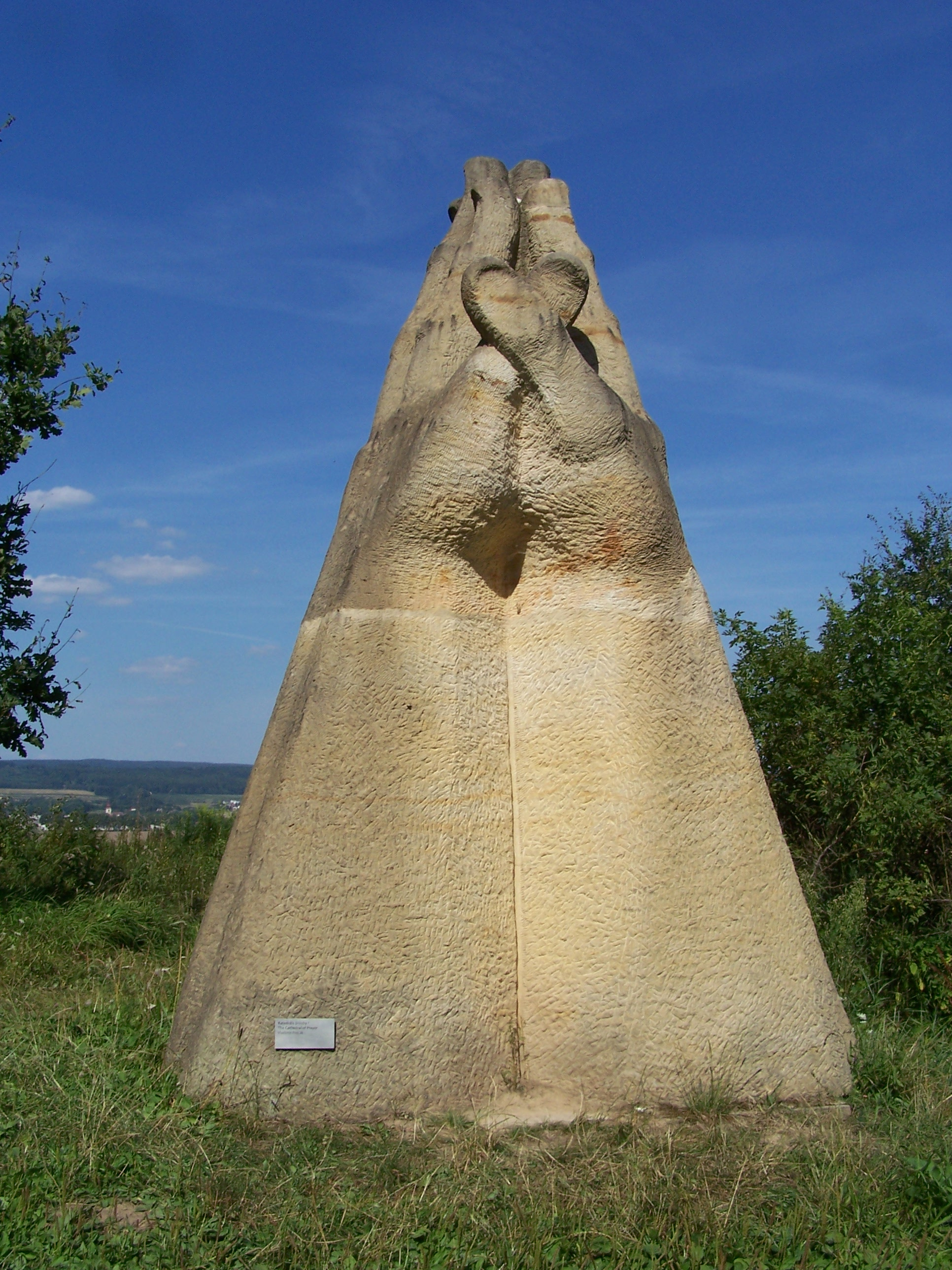 09. Katedrála prosby (Vladimír Preclík)